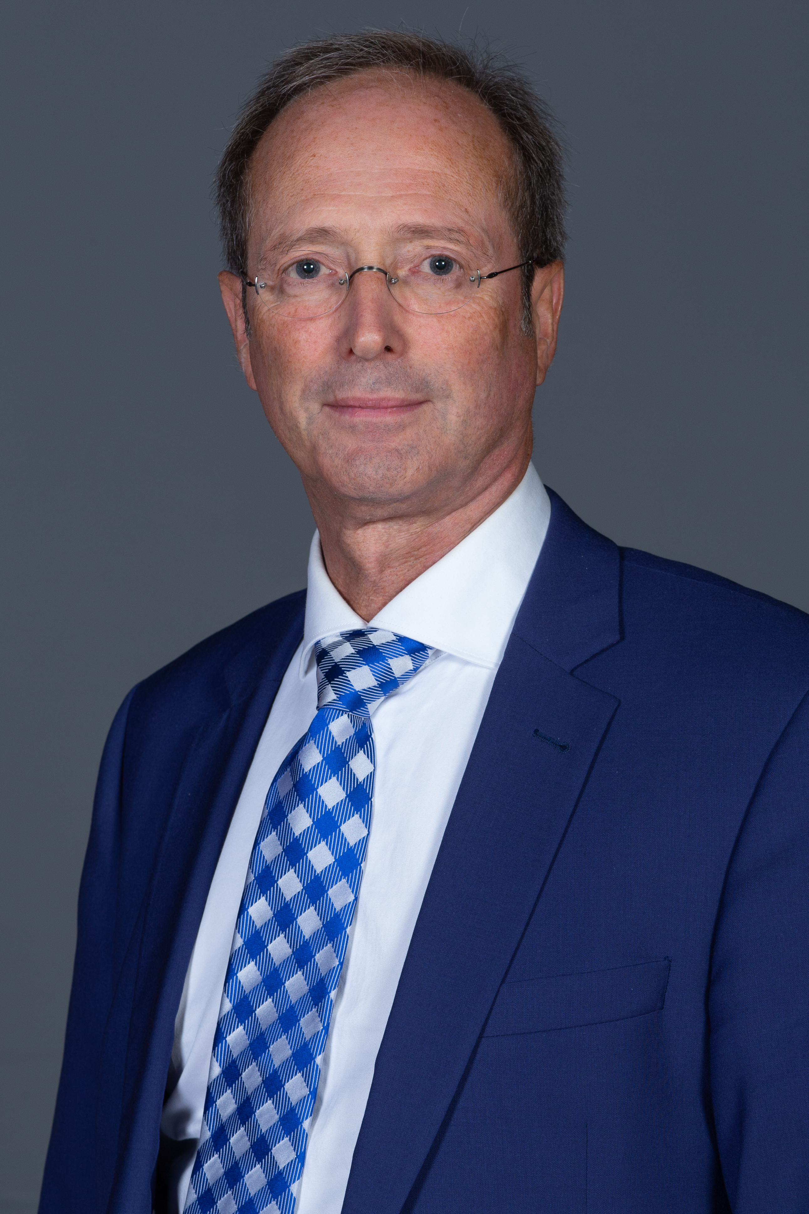 Abgeordnete(r) der Bürgerschaft der Freien und Hansestadt Hamburg Jenspeter Rosenfeldt